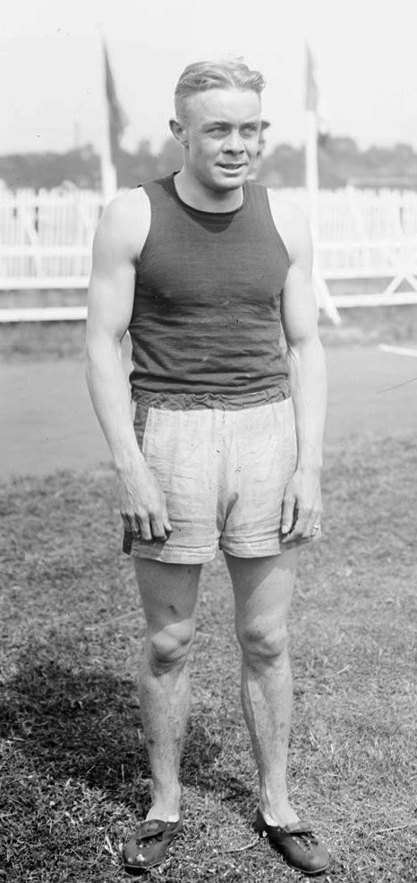 [1-6-19, l'Américain Earl William] Eby gagnant du 400 m [championnats d'athlétisme de l'armée américaine à Colombes] : [photographie de presse] / [Agence Rol]